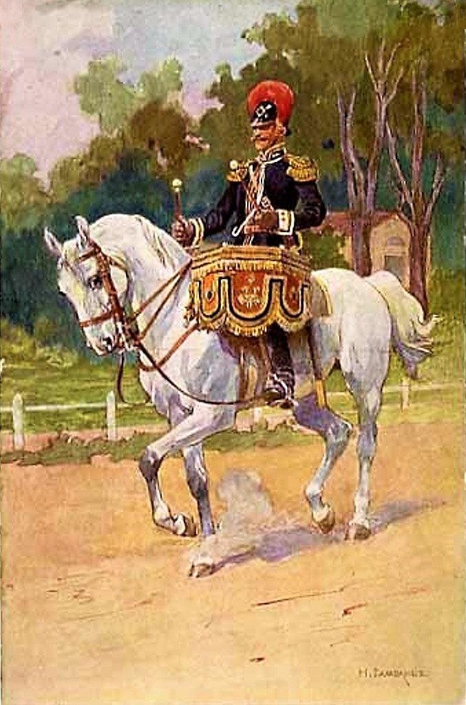 Николай Самокиш. Литаврщик 13-го драгунского Военного Ордена Генерал-Фельдмаршала графа Миниха пока. Почтовая открытка